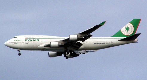 EVA 747